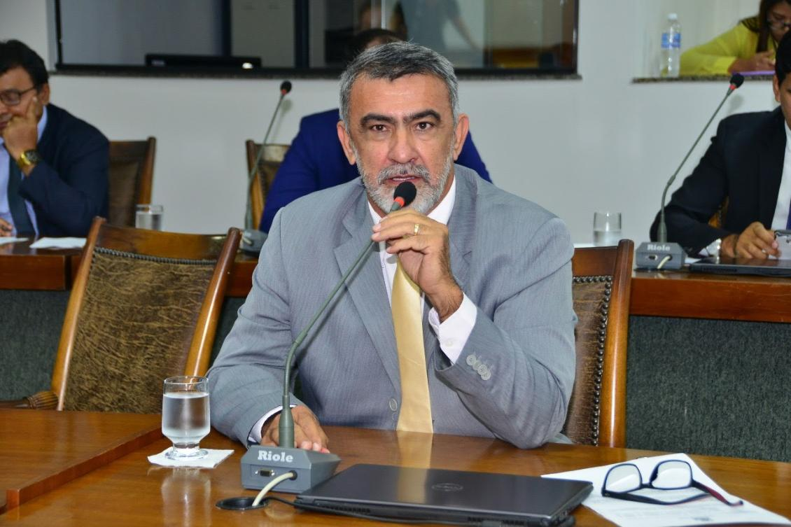 Ascomm